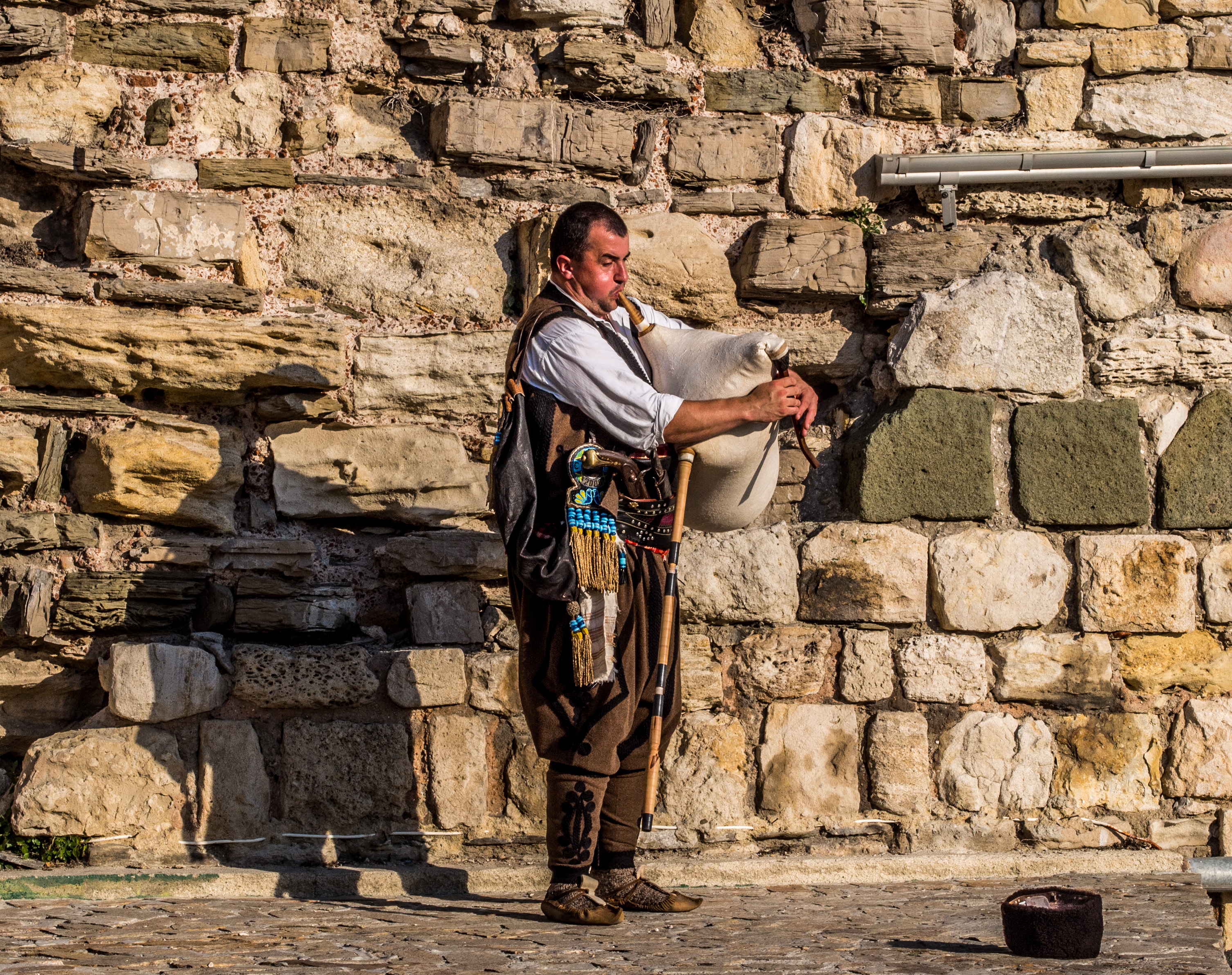 Nessebar, Bulgaria